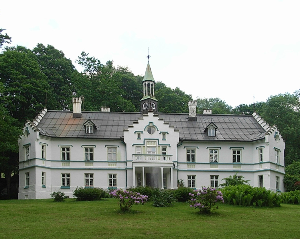 Schloss Buchenau in Buchenau, Gemeinde Lindberg, Landkreis Regen, Niederbayern